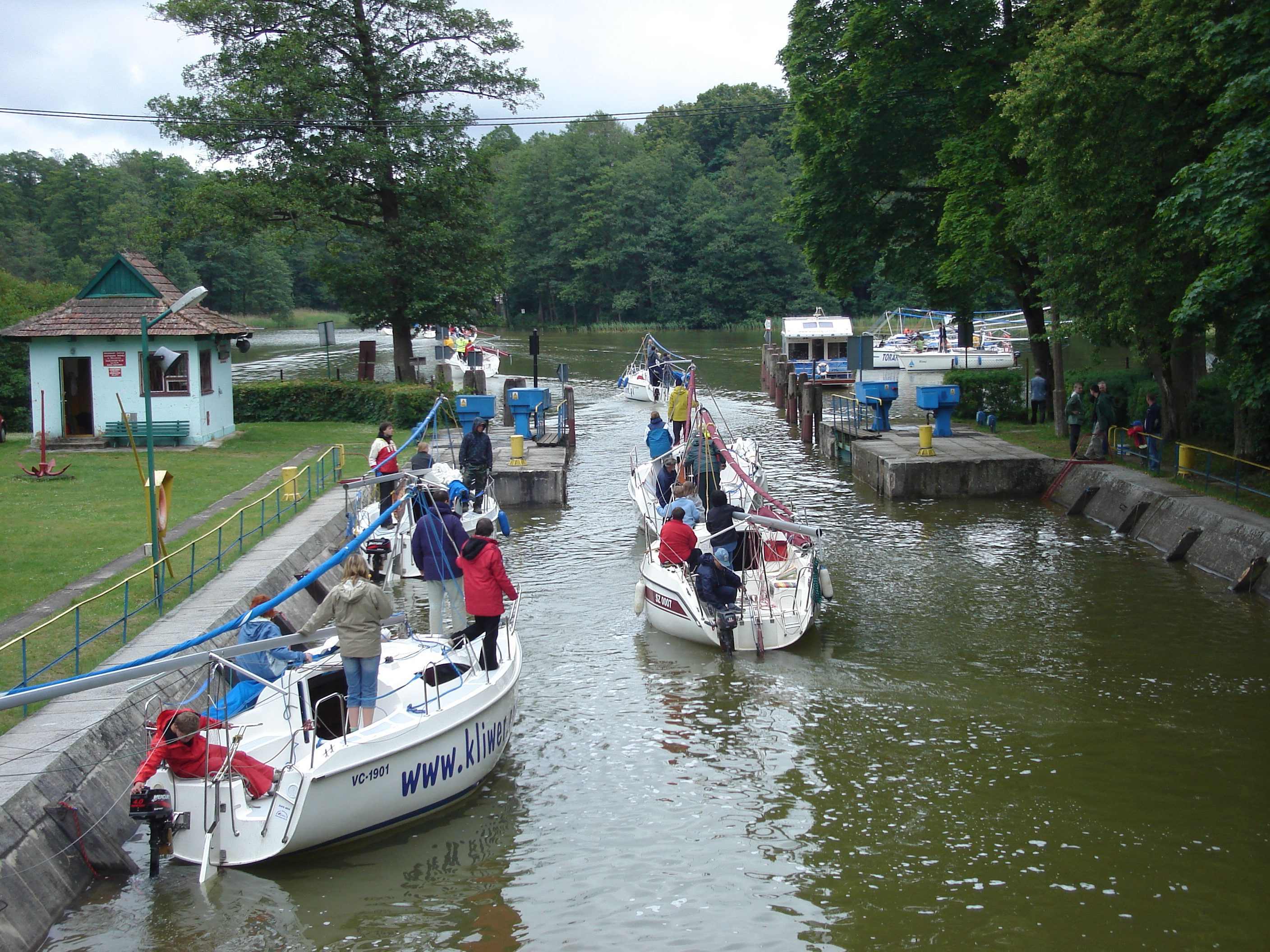 Śluza Guzianka. Jachty opuszczają śluzę, z prawej strony widoczne jednostki przygotowywujące się do wpłynięcia.